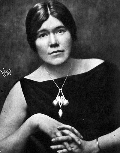 Ellen Rydelius